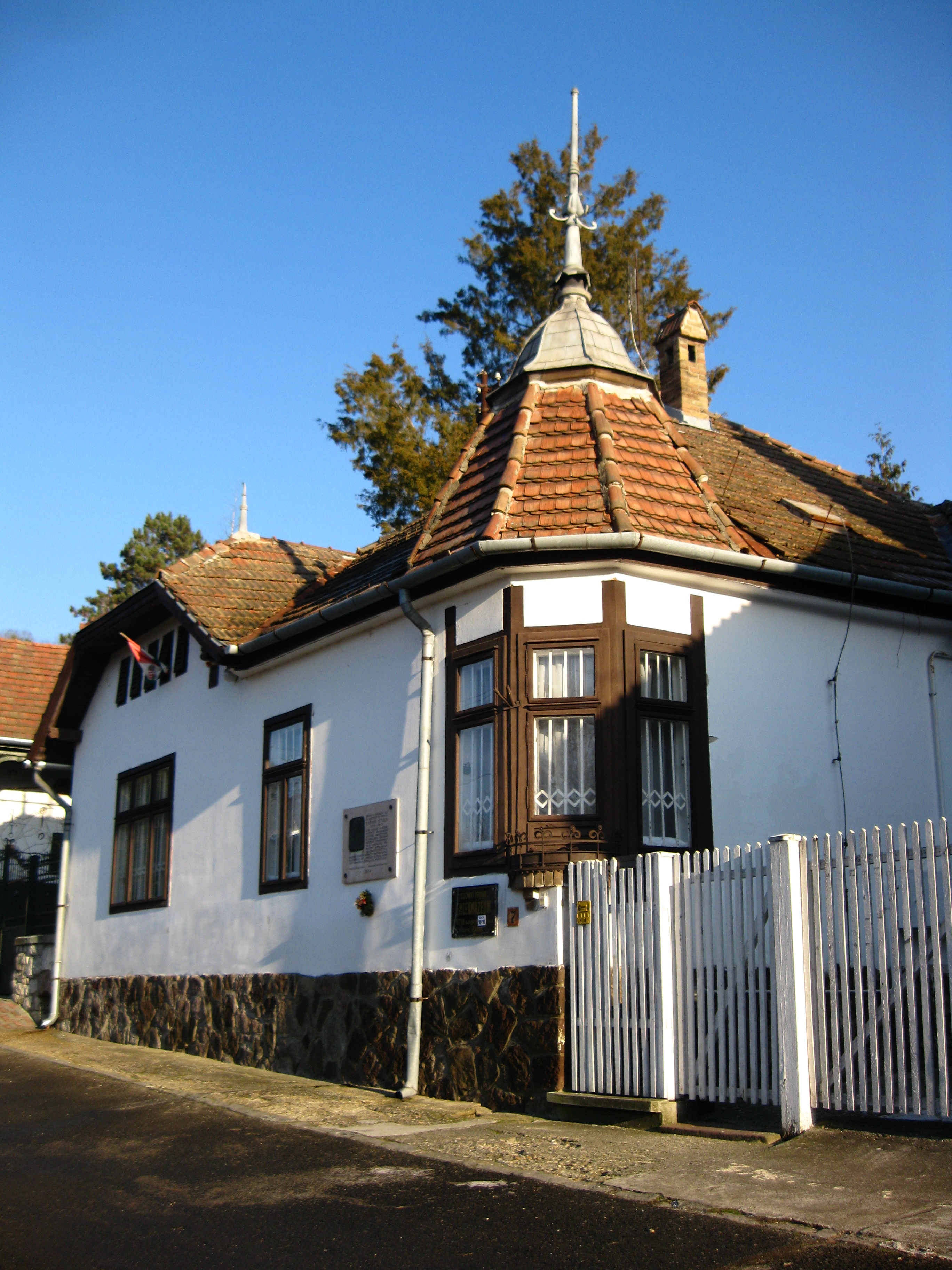 Szőnyi István-emlékház, a 'Bartóky u. 1-3-7-11-13-15., 17-19-21-25-29-31, 33-35 és 6-8-10-14 számú épületek' részeként, beépítési mód és utcakép védelme címen, védett, azonosító: -6446 - Zebegény, 2627, Bartóky u. 7. This is a photo of a monument in Hungary. Identifier: -6446